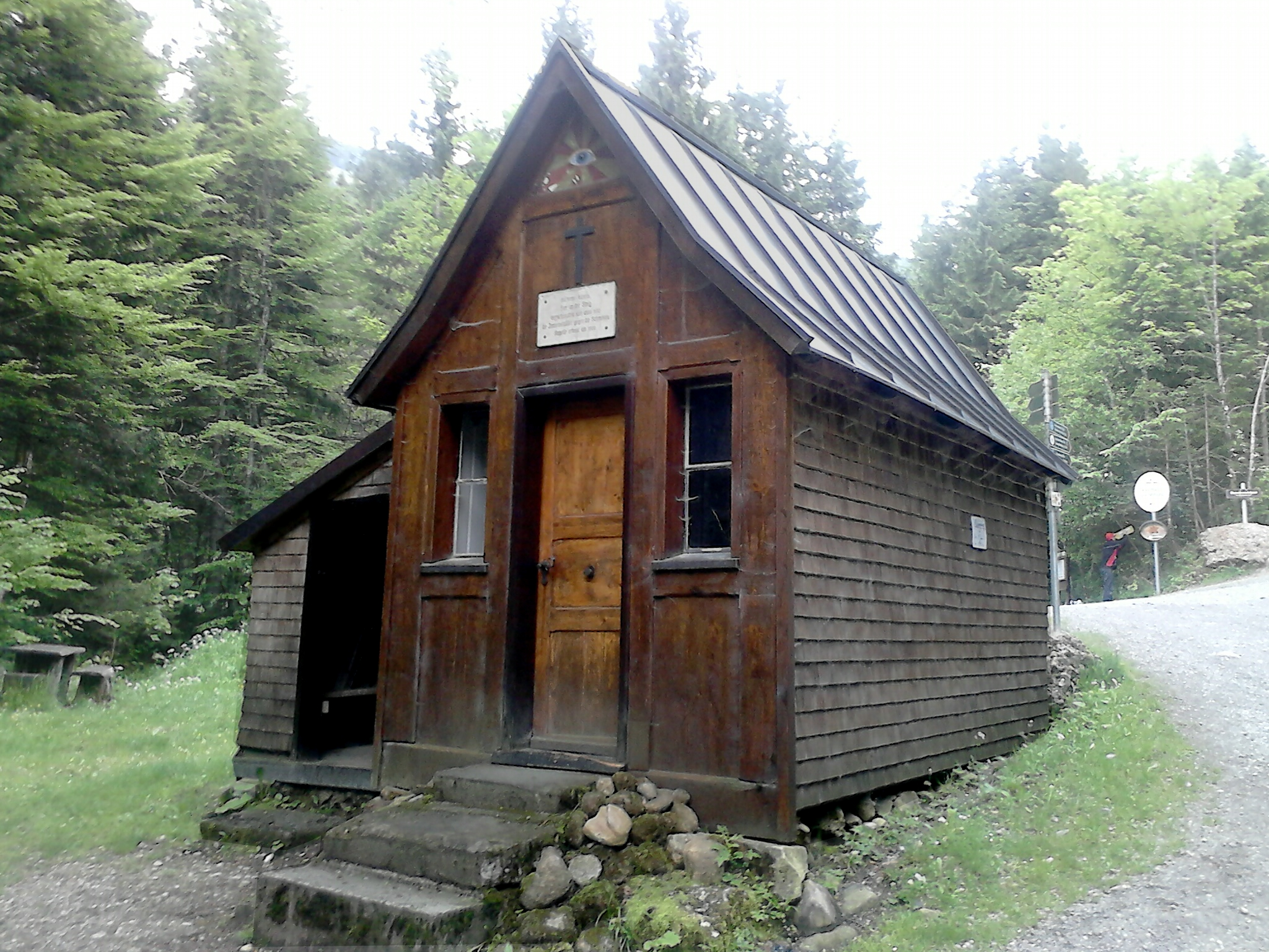 Immenstadt Steigbachtal Hölzerne Kapelle